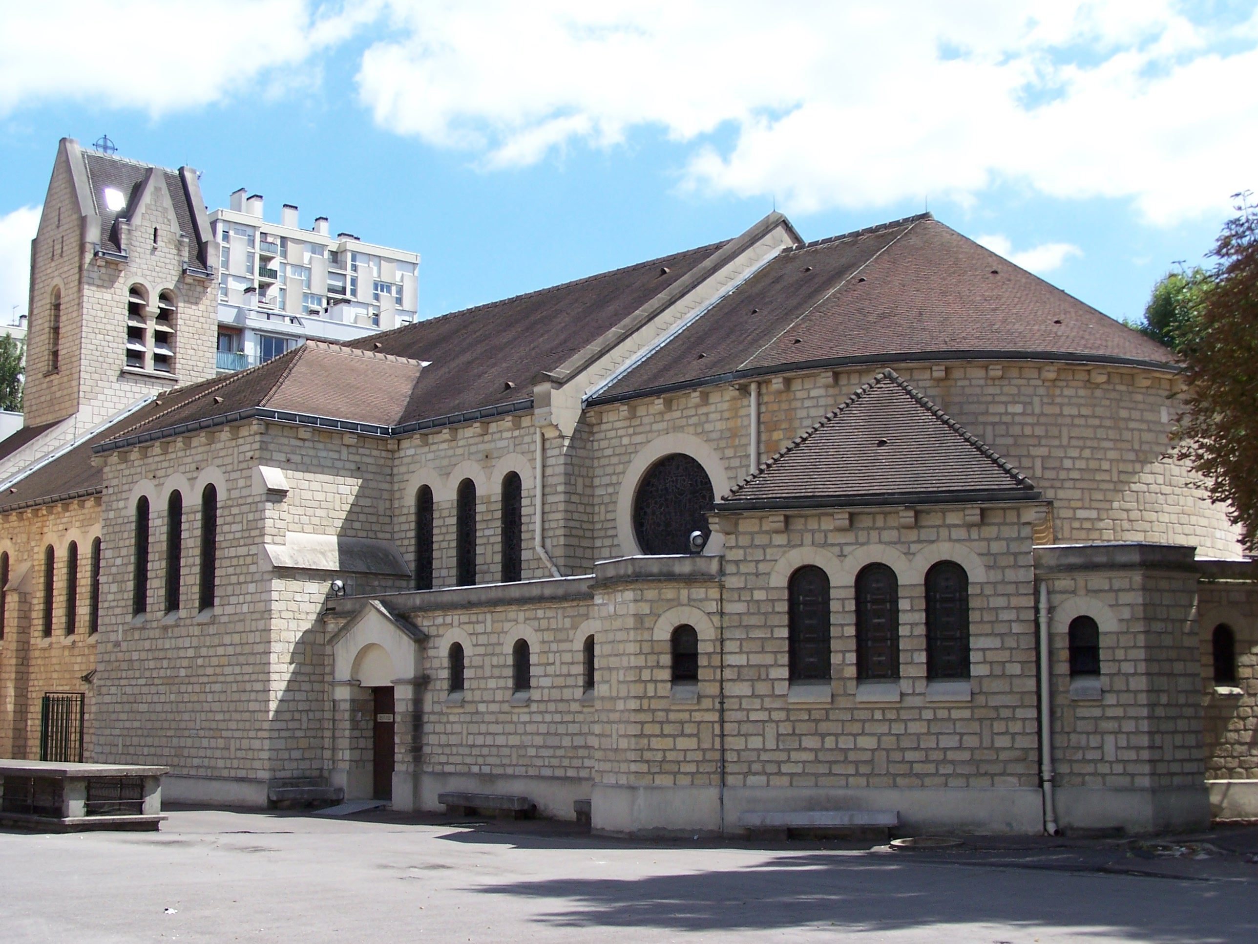 Vue générale extérieure de l'église Notre-Dame-des-Otages à Paris.